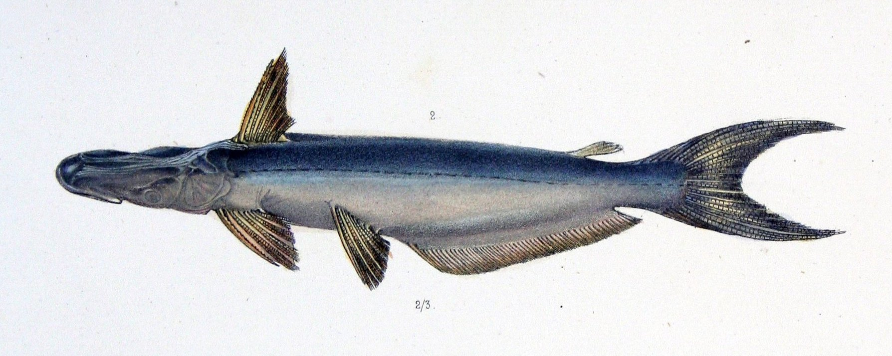 Ageneiosus ucayalensis Cast. = Ageneiosus ucayalensis Castelnau, 1855